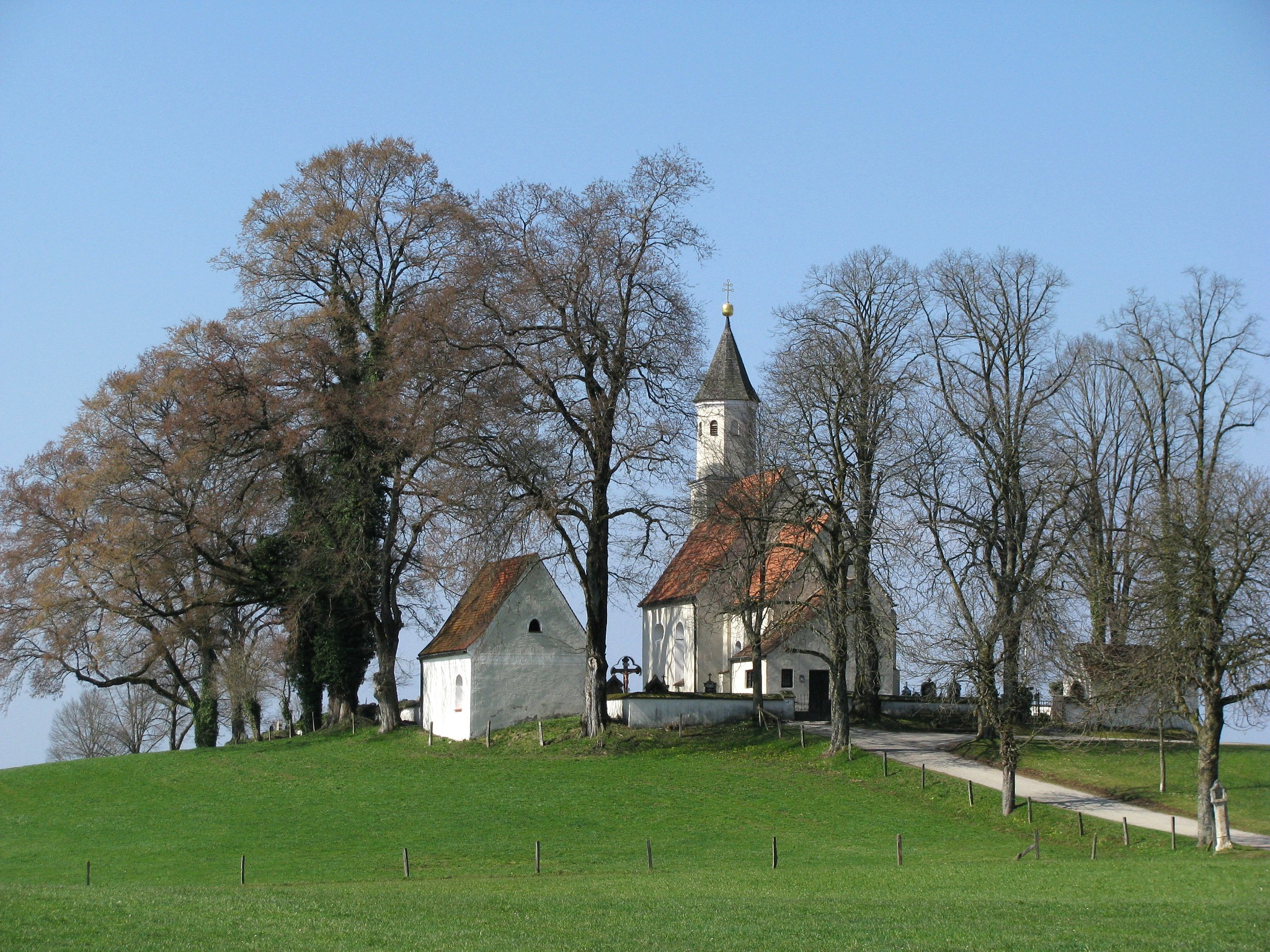 Kreuzbichlkapelle von Osten; links die Gruftkapelle der Familie Schilcher; rechts am Bildrand ein Bildstock aus dem 16. Jh.